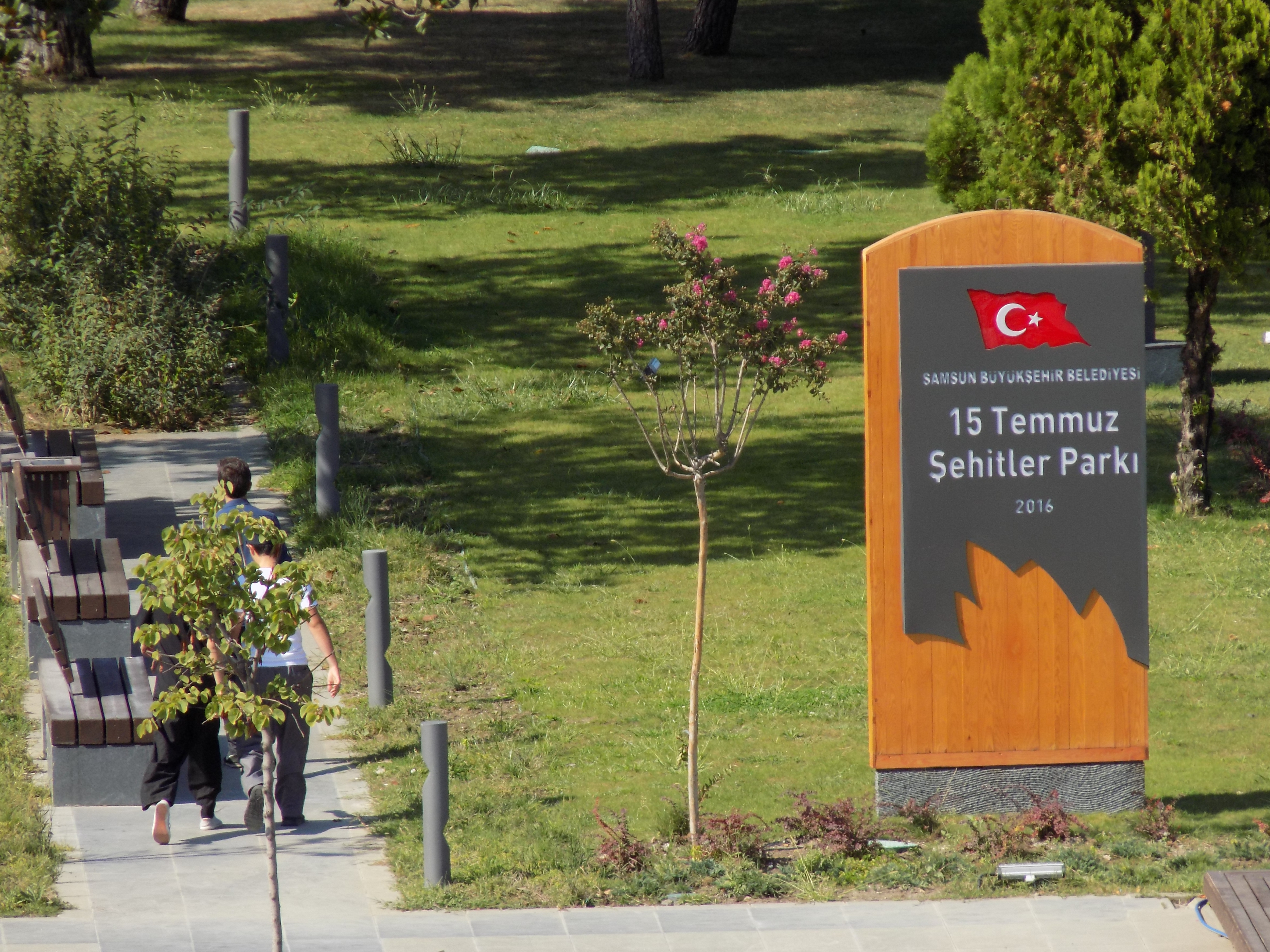 Atatürk Kültür Merkezi ve Panorama 1919 Müzesi arasında yer alan 15 Temmuz Şehitler Parkı'nın tabelası.